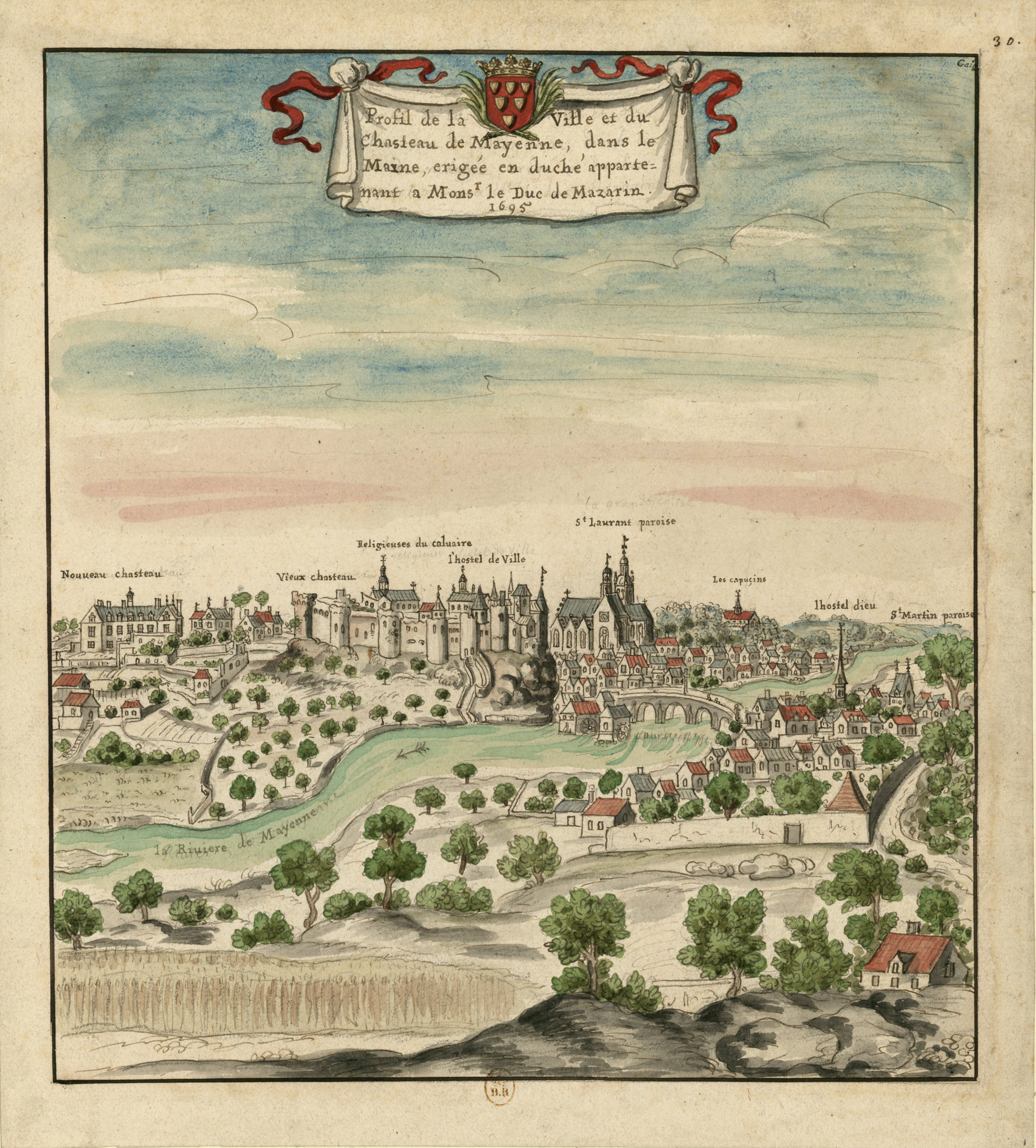 Profil de la Ville et du Chasteau de Mayenne, dans le Maine, érigée en duché appartenant à Mons.r le Duc de Mazarin.